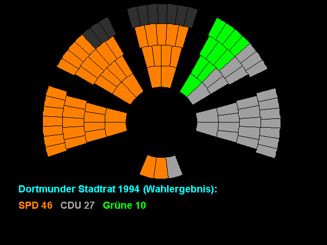 Sitzordnung im Dortmunder Stadtrat nach der Kommunalwahl 1994